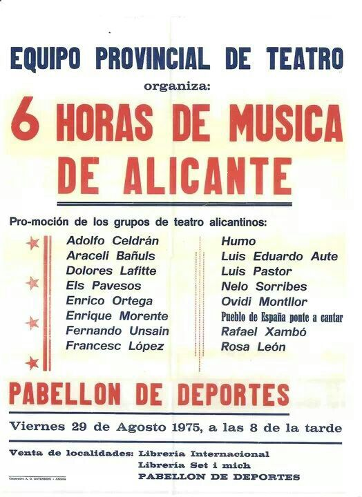 Festival Alacant 1975